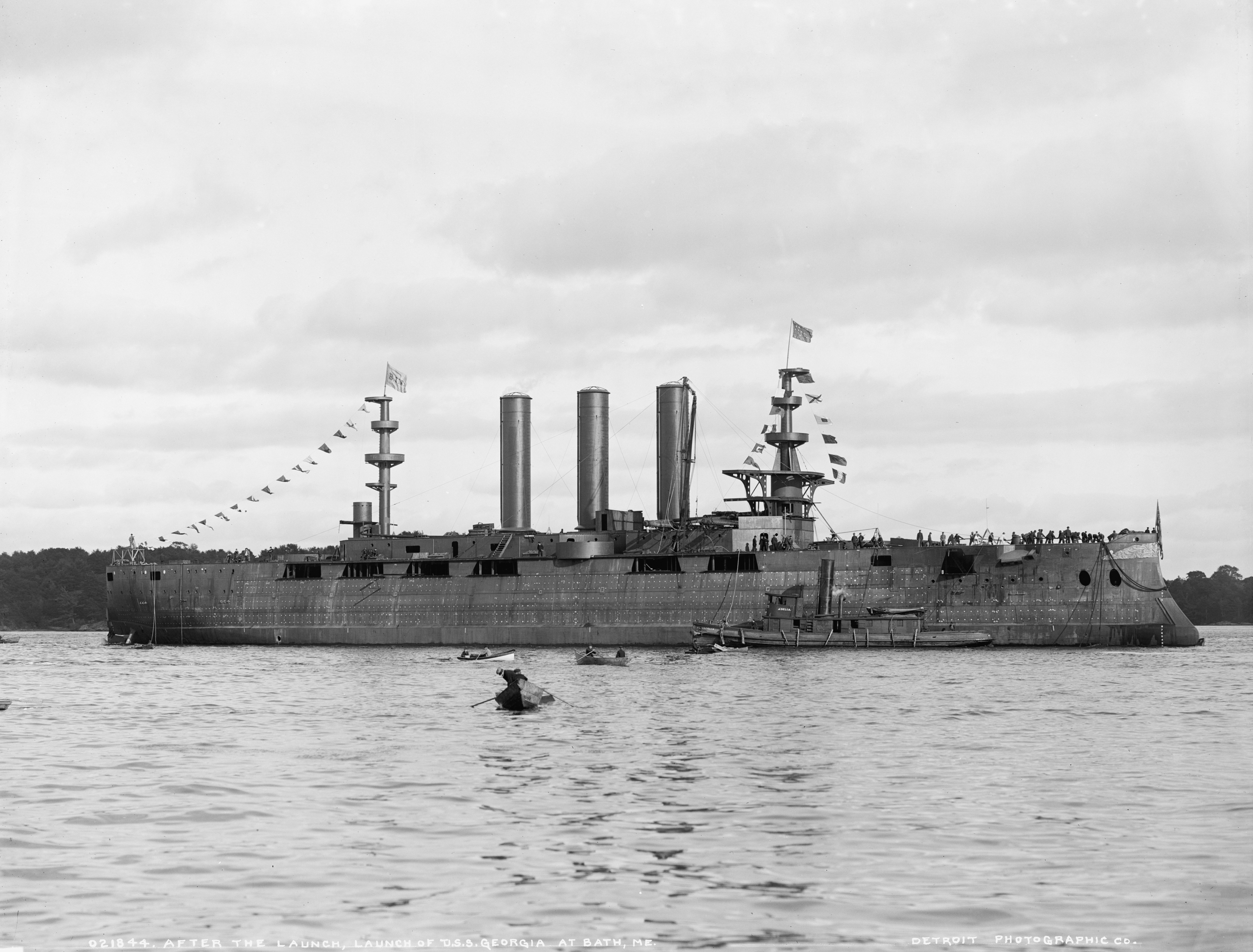 USS Georgia after launch